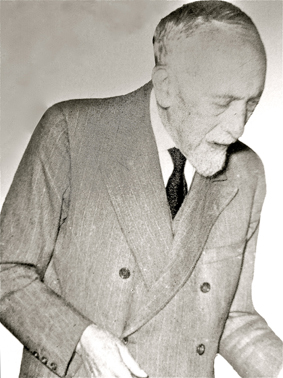 medico, psicologo e psichiatra italiano, può essere considerato uno dei fondatori della psicologia e della Neuropsichiatria infantile italiana.